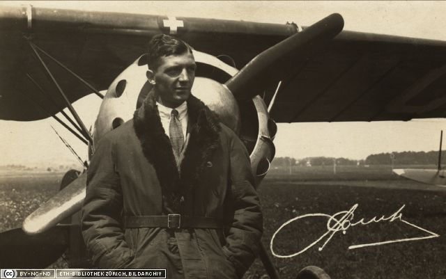 Alfed Comte in 1920, maybe in Zürich-Schwamendingen